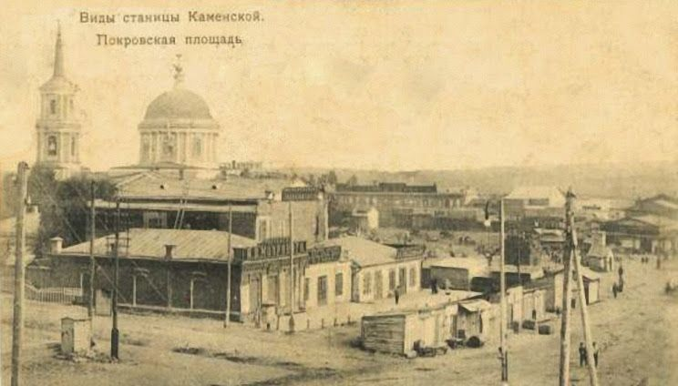 виды станицы Каменской (ныне город Каменск-Шахтинский Ростовской области РФ), площадь Покровская